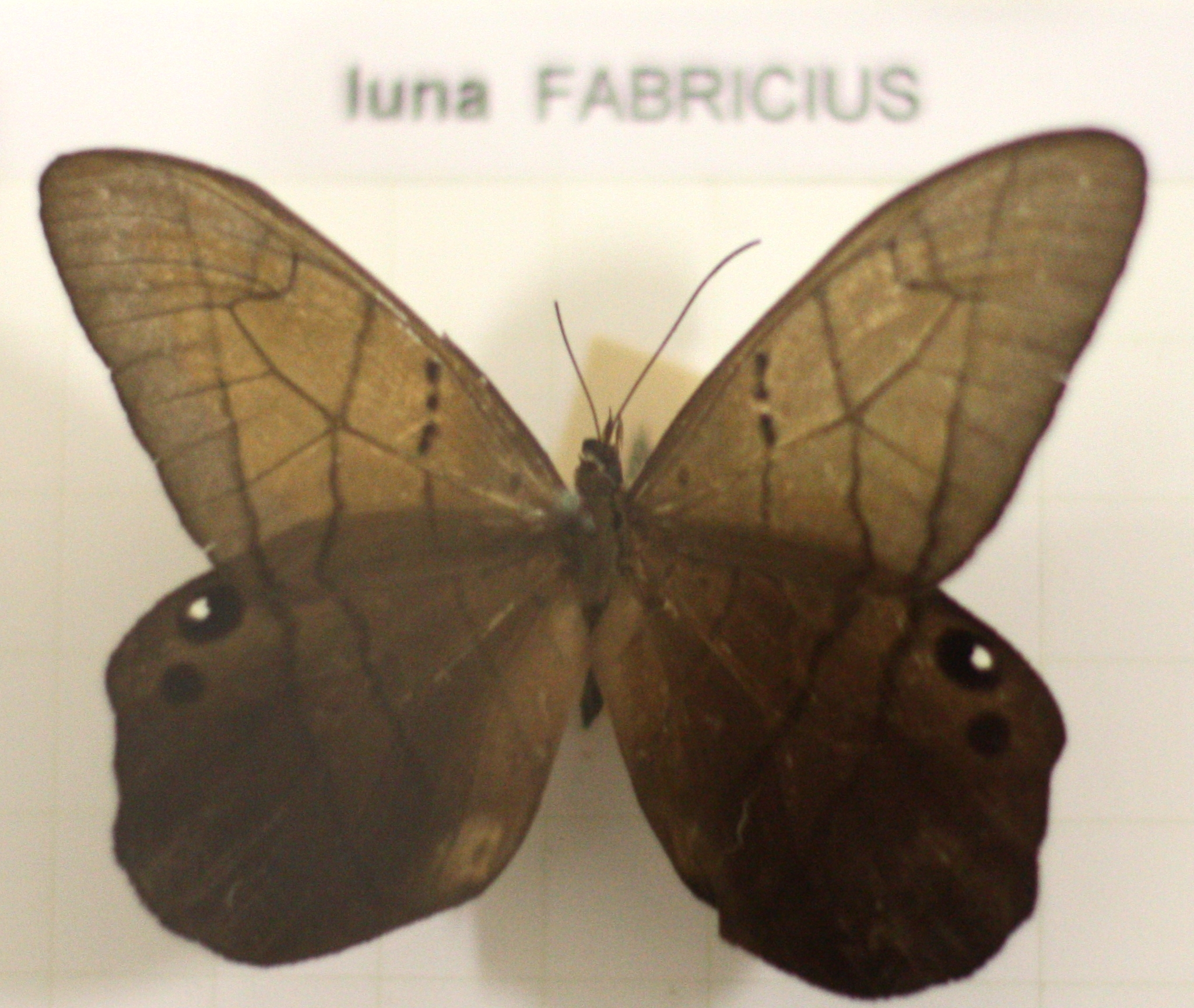 Naturkundliche Sammlung Übermaxx Überseenuseum Bremen; Schmetterlinge und andere